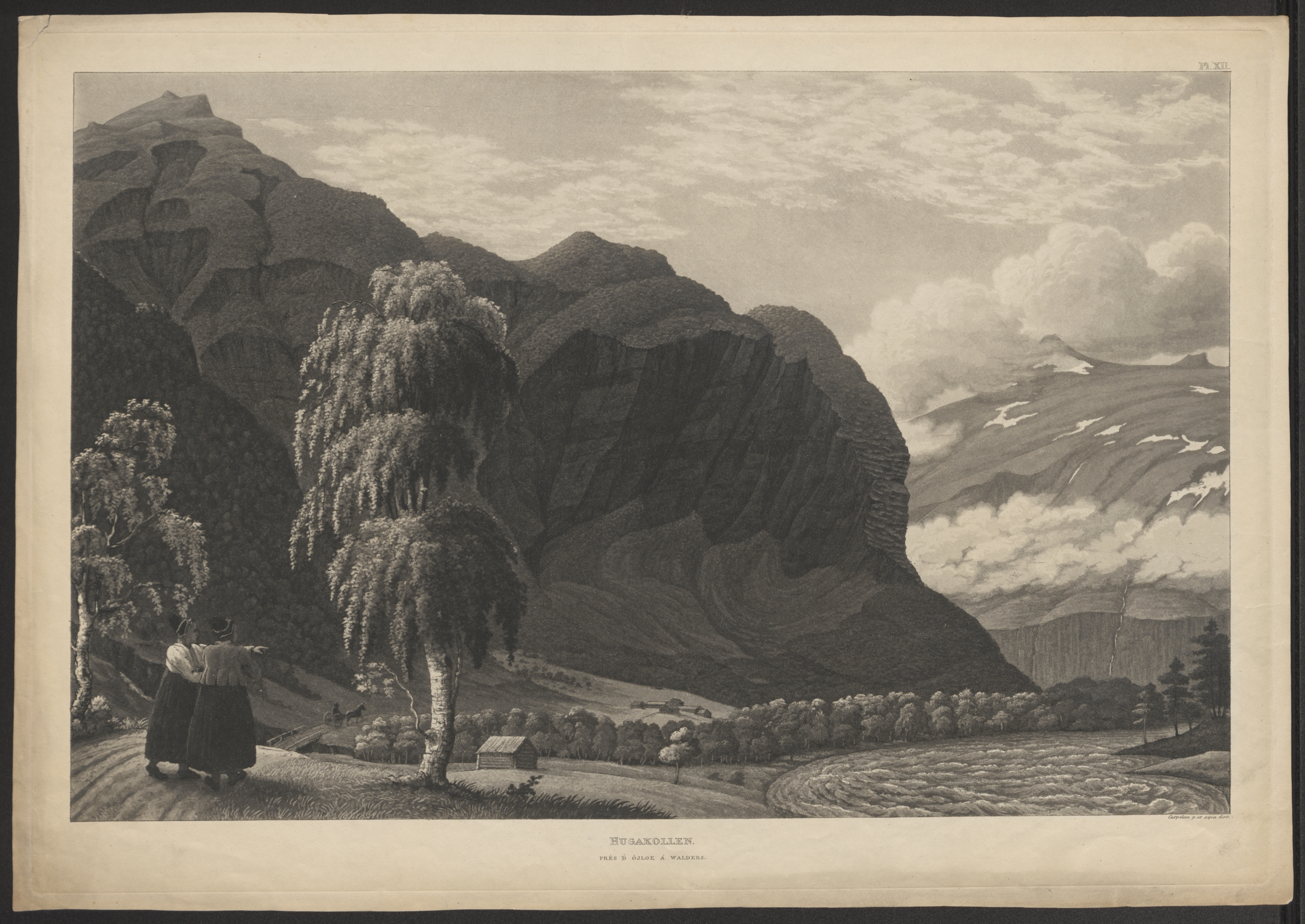 Bildet er hentet fra Riksantikvaren. Hugakollen près ´d Ôjloe 'a Walders. Pl XII Eier : Riksantikvaren Sted : Norway, Oppland, Vang Medium